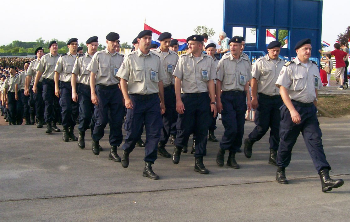 Pripadnici HRM Karlovac 2008